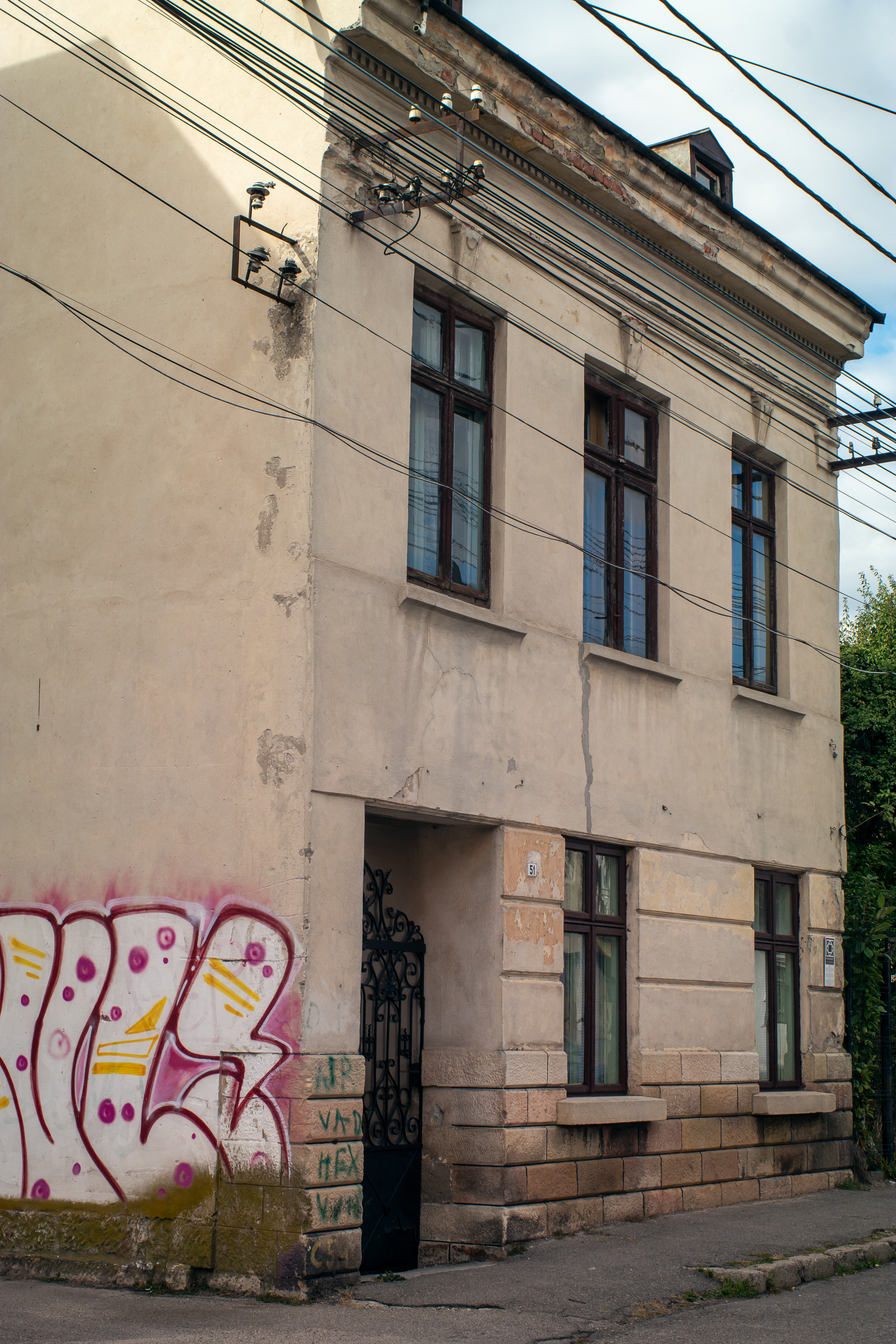 Casa Galigan, Câmpulung. Ridicată la sfârșitul secolului XIX, atestă procesul de adaptare a planului tradițional în "L" și a modelelor spațiale locale - prispa în lungul lotului închisă cu geamlâc, la cerințele perioadei. Tranziția spre modernitate este marcată de decorația clasicizantă a fațadei și accesul prin gang în curtea imobilului.